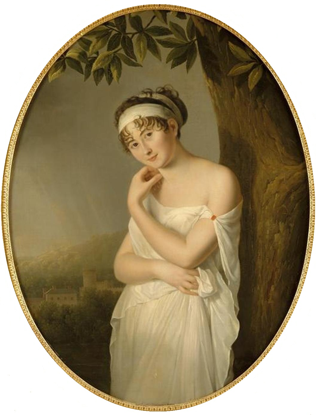 Juliette Récamier est une femme de lettres et tient l'un des salons intellectuels les plus brillants de Paris.